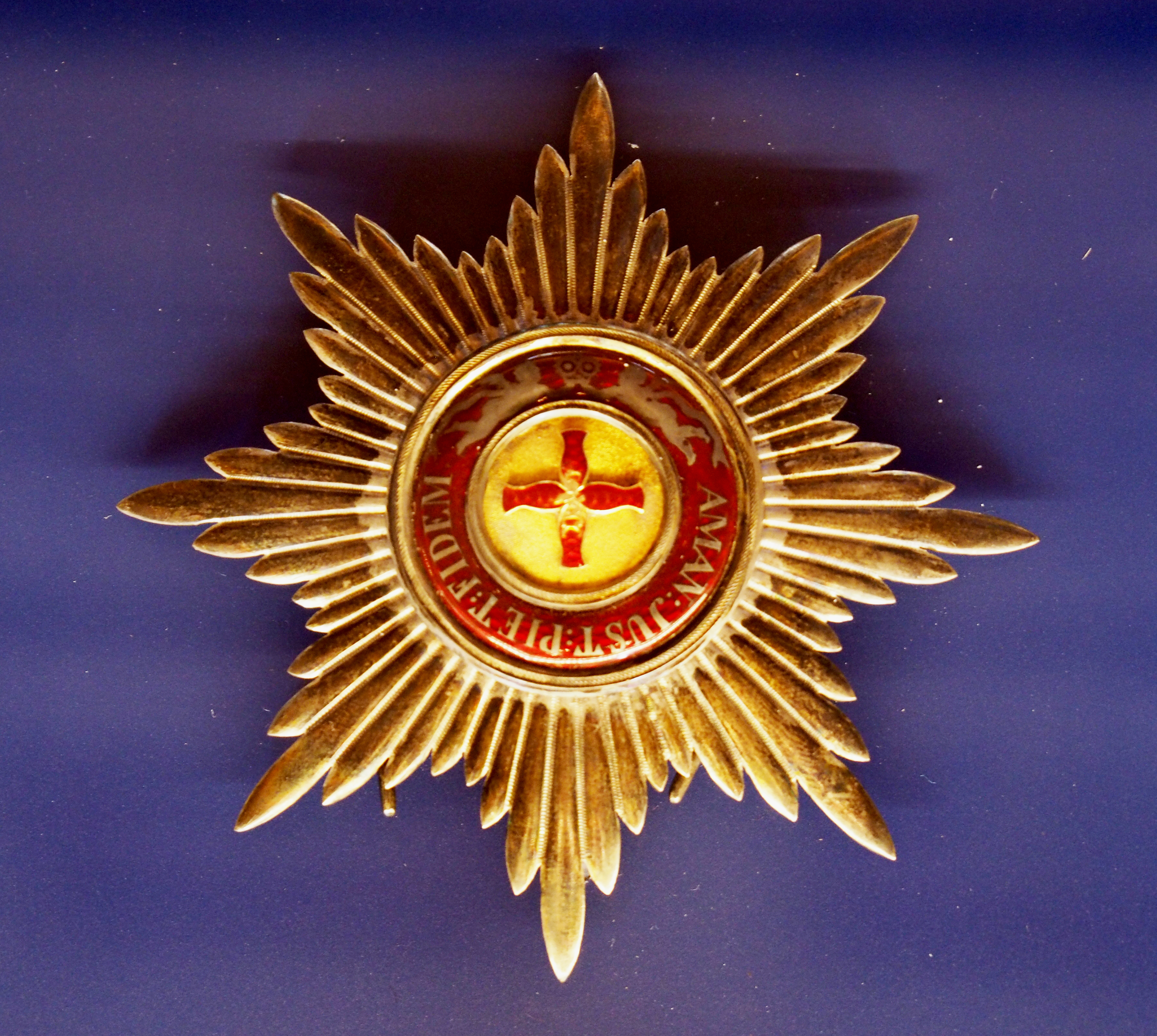 Bruststern zum Großkreuz des Russisch-Kaiserlichen Ordens der Heiligen Anna 1. Klasse, 1808 von Zar Alexander I. an Goethe verliehen